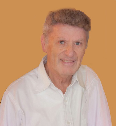 תמונתו של ד"ר אפרים קם